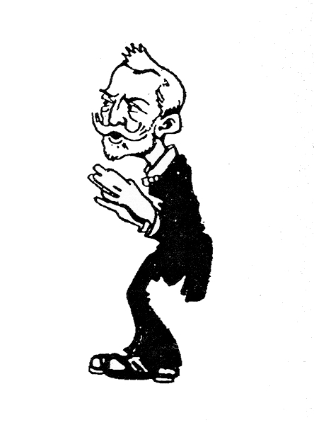 Caricatura de Josep Pella i Forgas